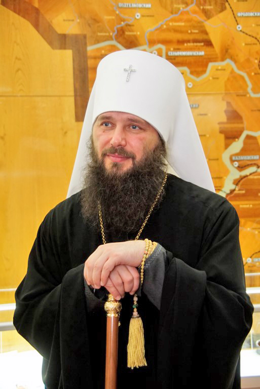 Митрополит Волгоградский и Камышинский Феодор включен в состав Общественной палаты Волгоградской области